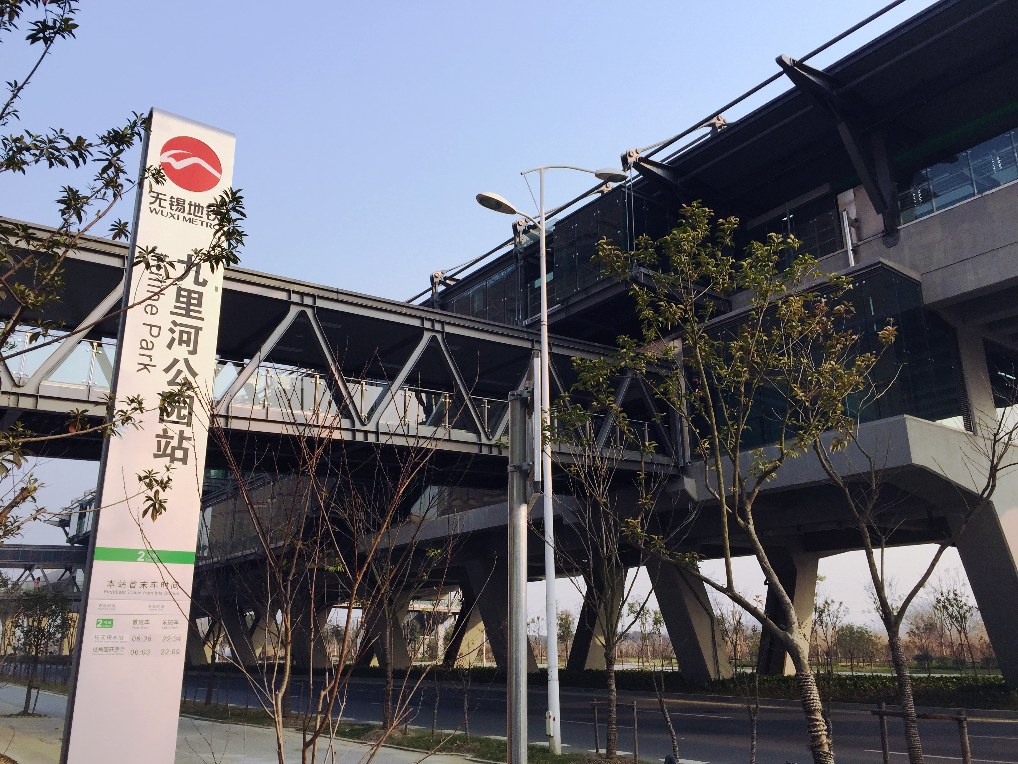 無錫地鐵2號線九里河公園站